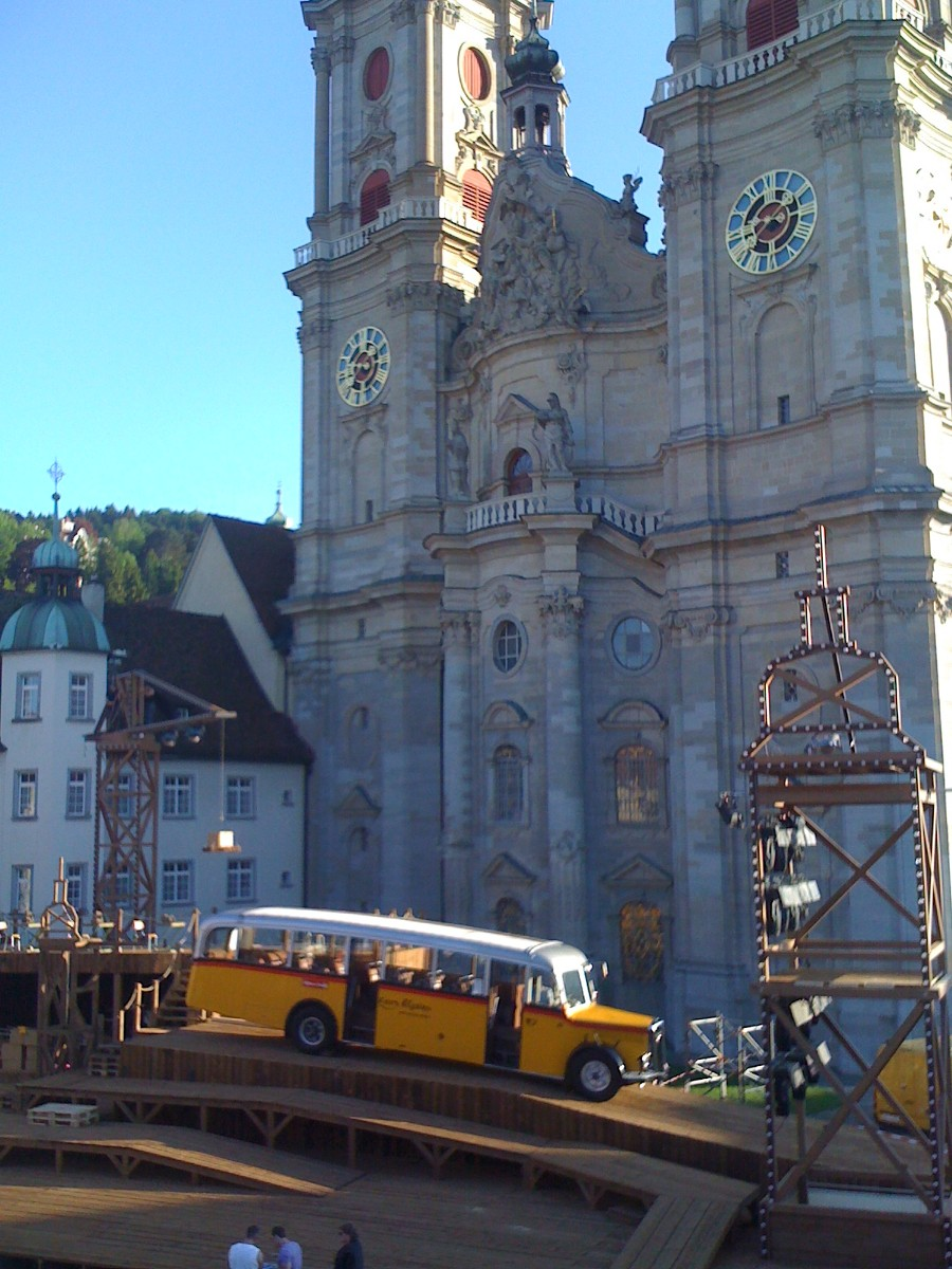 Postauto von Saurer, Typ S4C Baujahr 1948, in St.Gallen auf der Bühne der Festspiele.